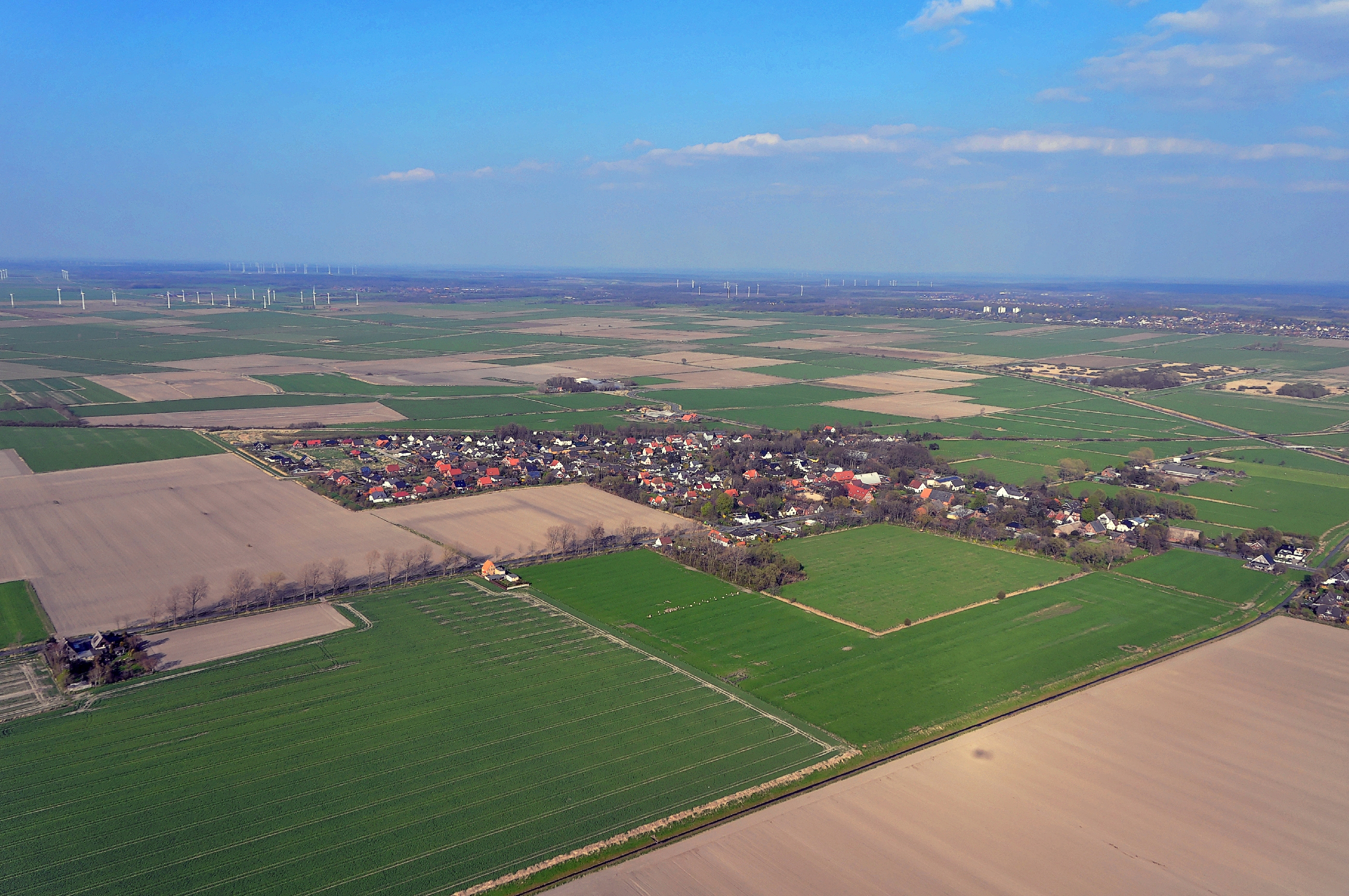 Luftbilder von der Nordseeküste 2013-05